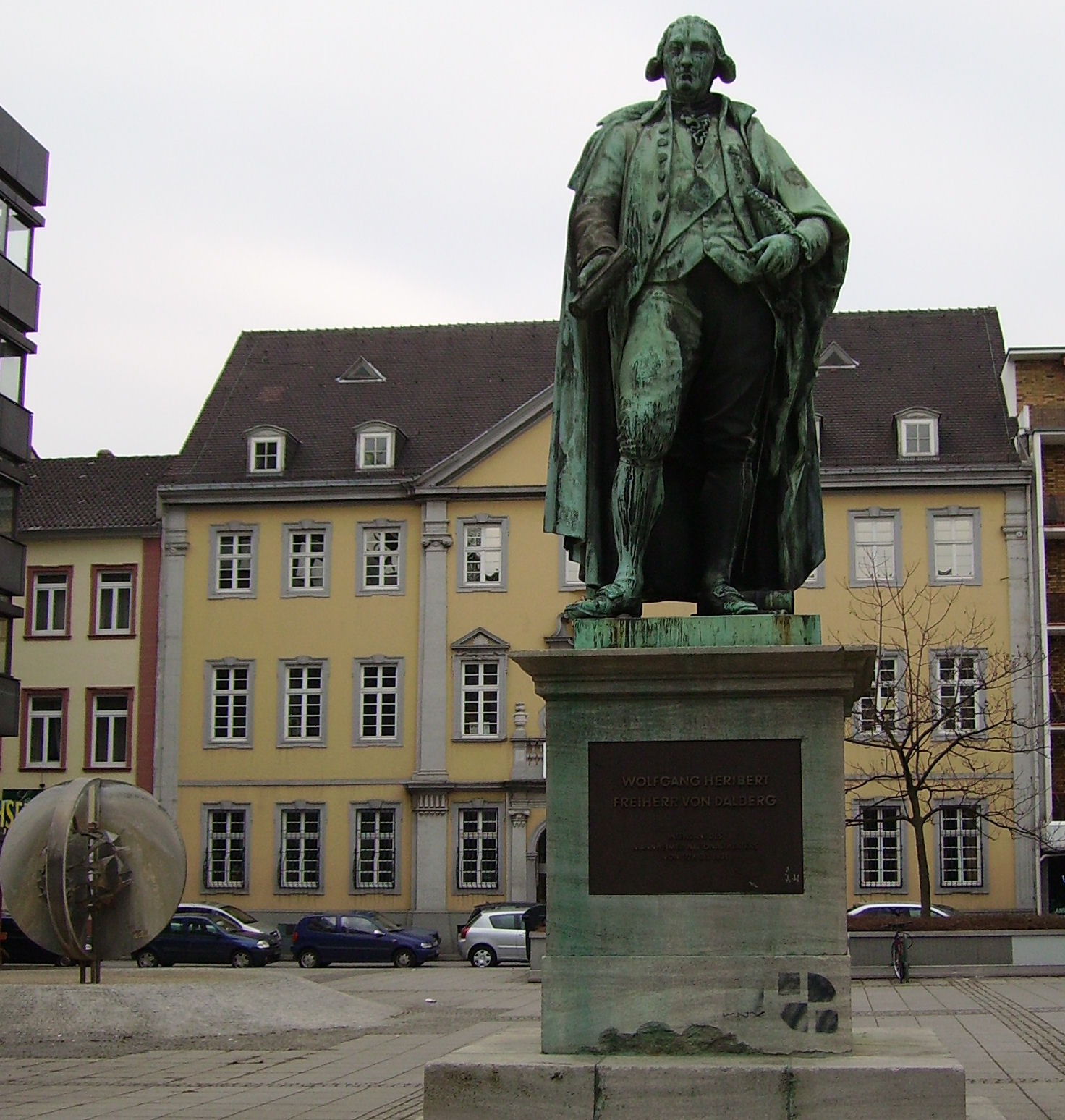 Mannheim in Germany at the Rhine river